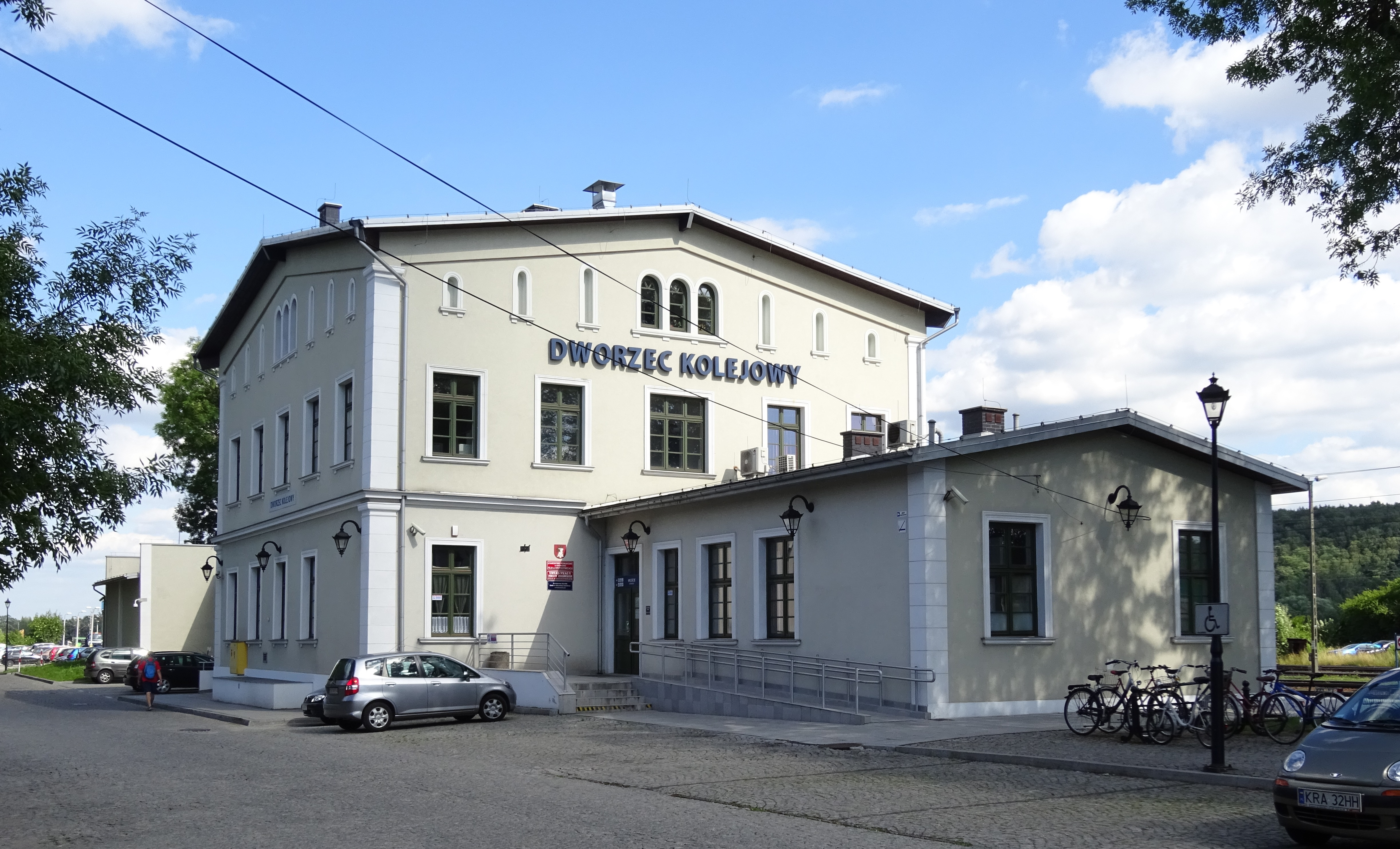 Dworzec Kolejowy w Krzeszowicach - widok od strony ulicy.